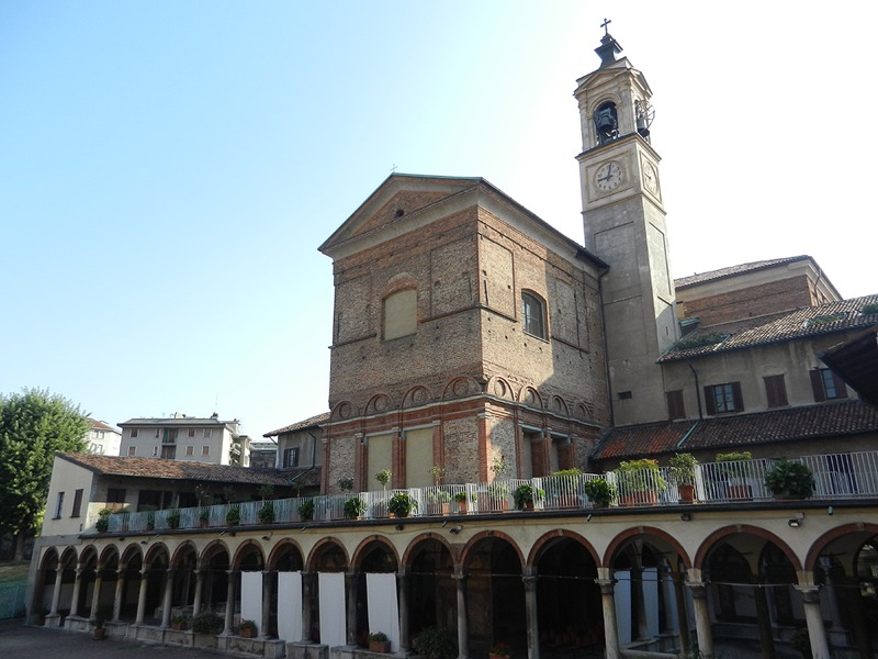 Milano - Abside del Santuario di S. Maria alla Fontana